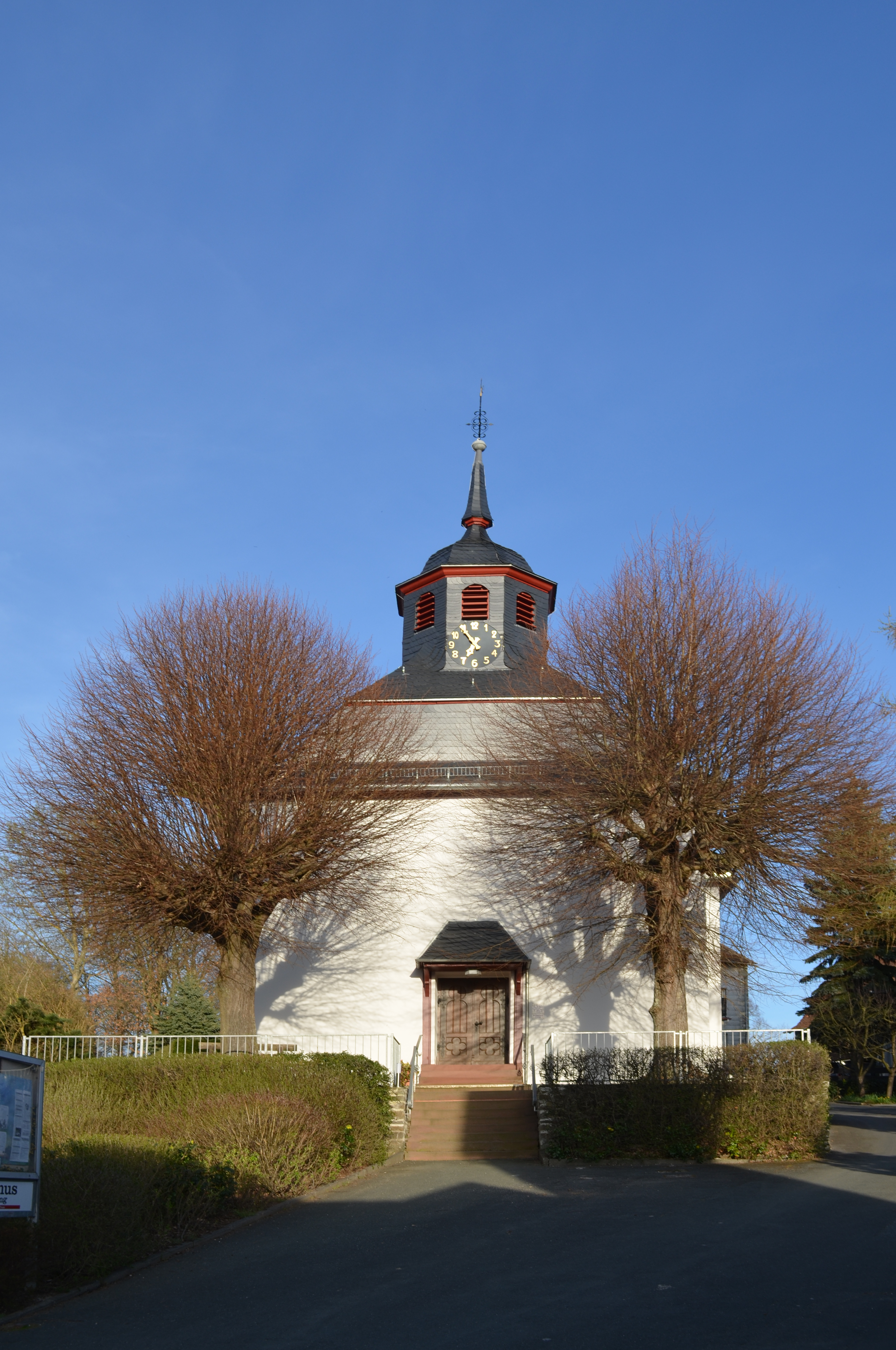 Westerfeld, Neu-Anspach, Hessen, Kirche